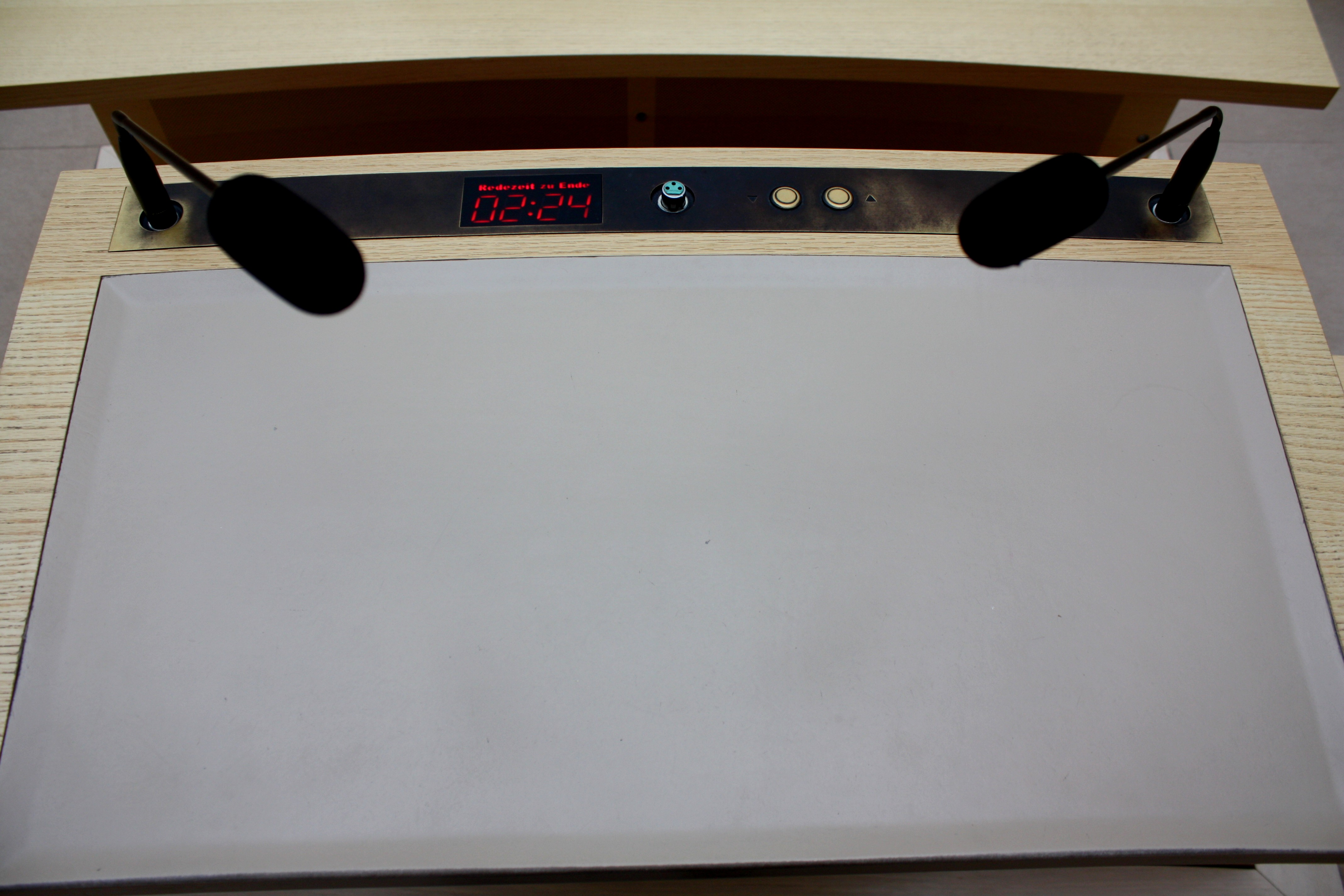 Plenarsaal des Bayerischen Landtag: Rednerpult mit Anzeige zur Rednerzeit